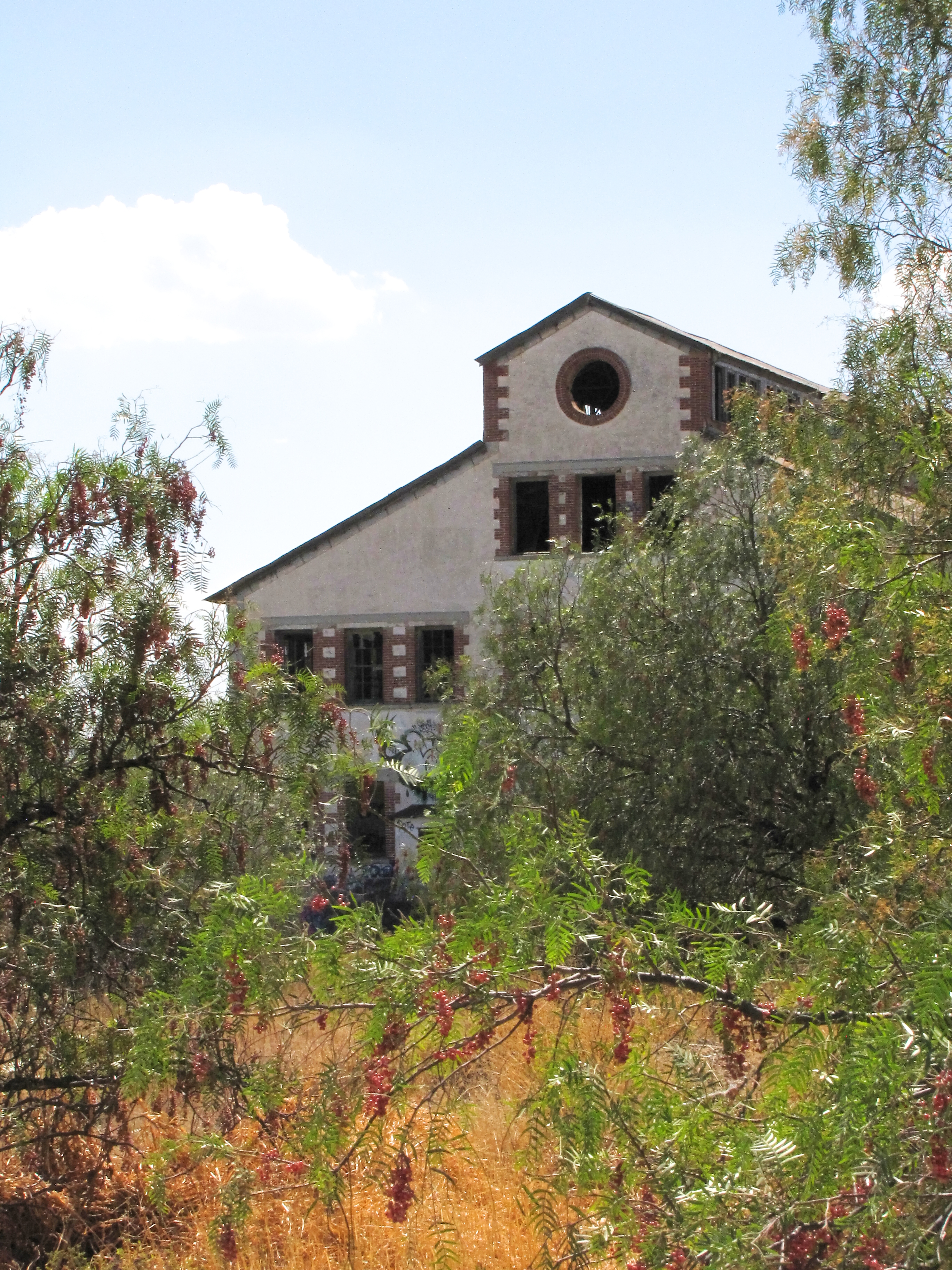 Nave principal de los Talleres de Maestranza. Aunque la construcción permanece en pie junto con algunas otras edificaciones en el mismo predio se encuentra abandonada y solo es utilizada por grafitteros e indigentes como refugio.